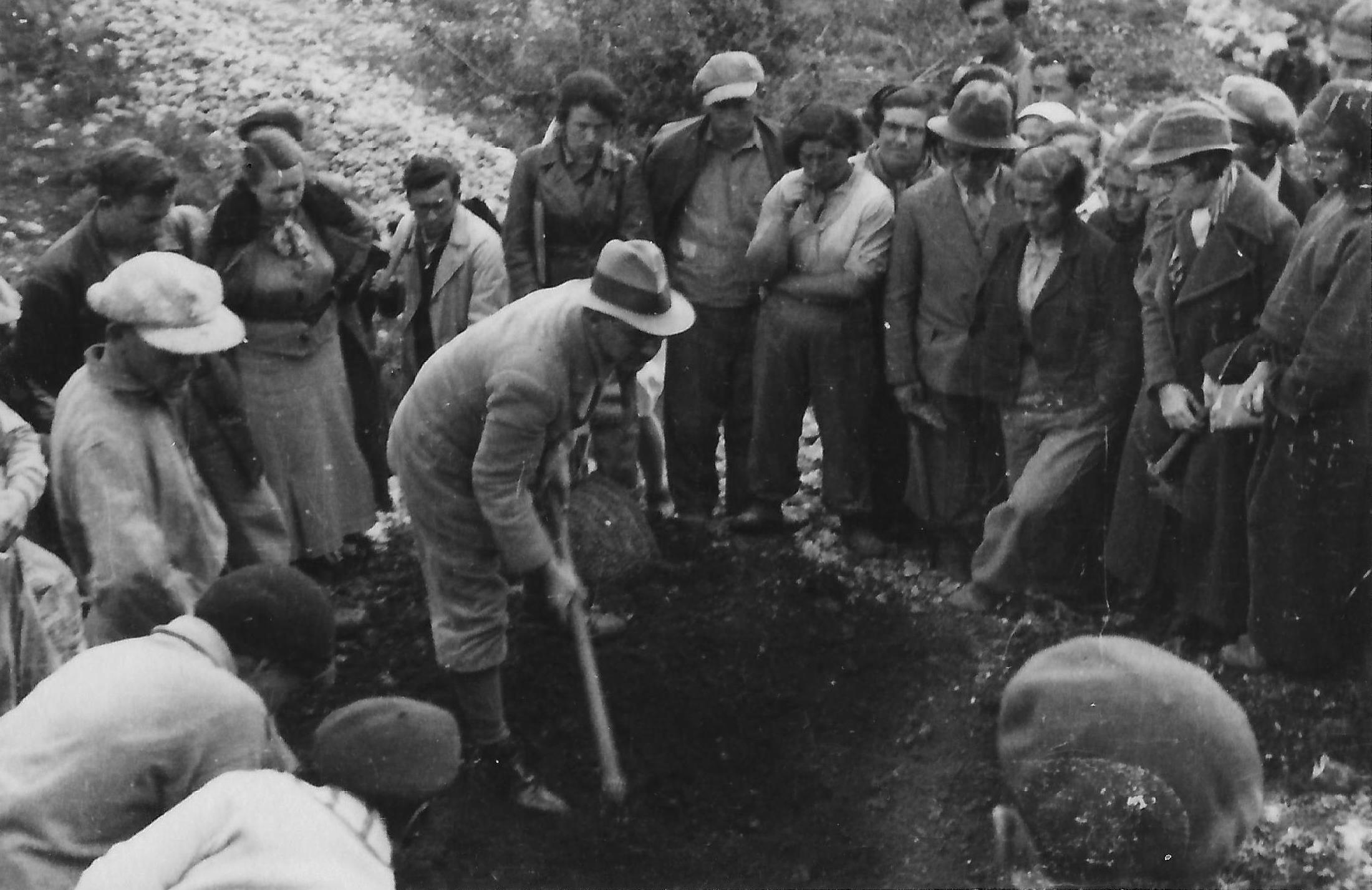 אלכסנדר איג בעבודות הקמת הגן הבוטני בהר הצופים